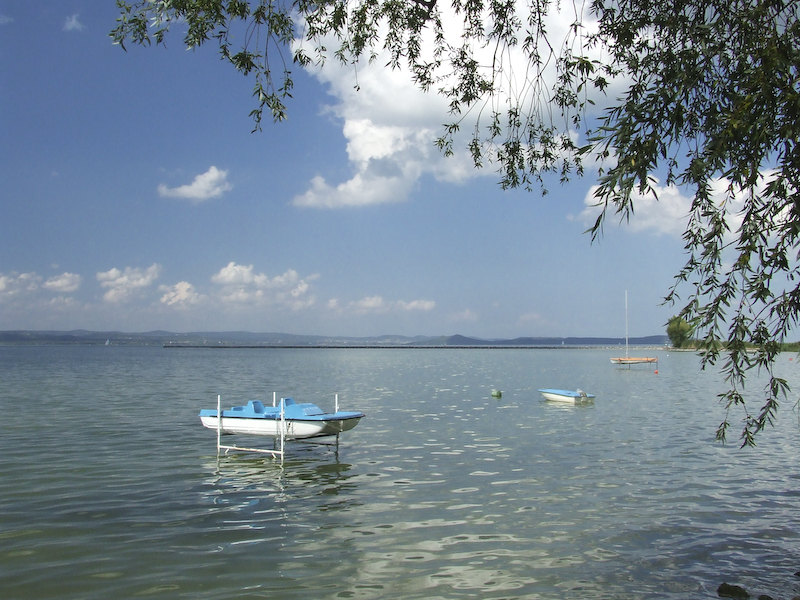 Balatonöszödi strand